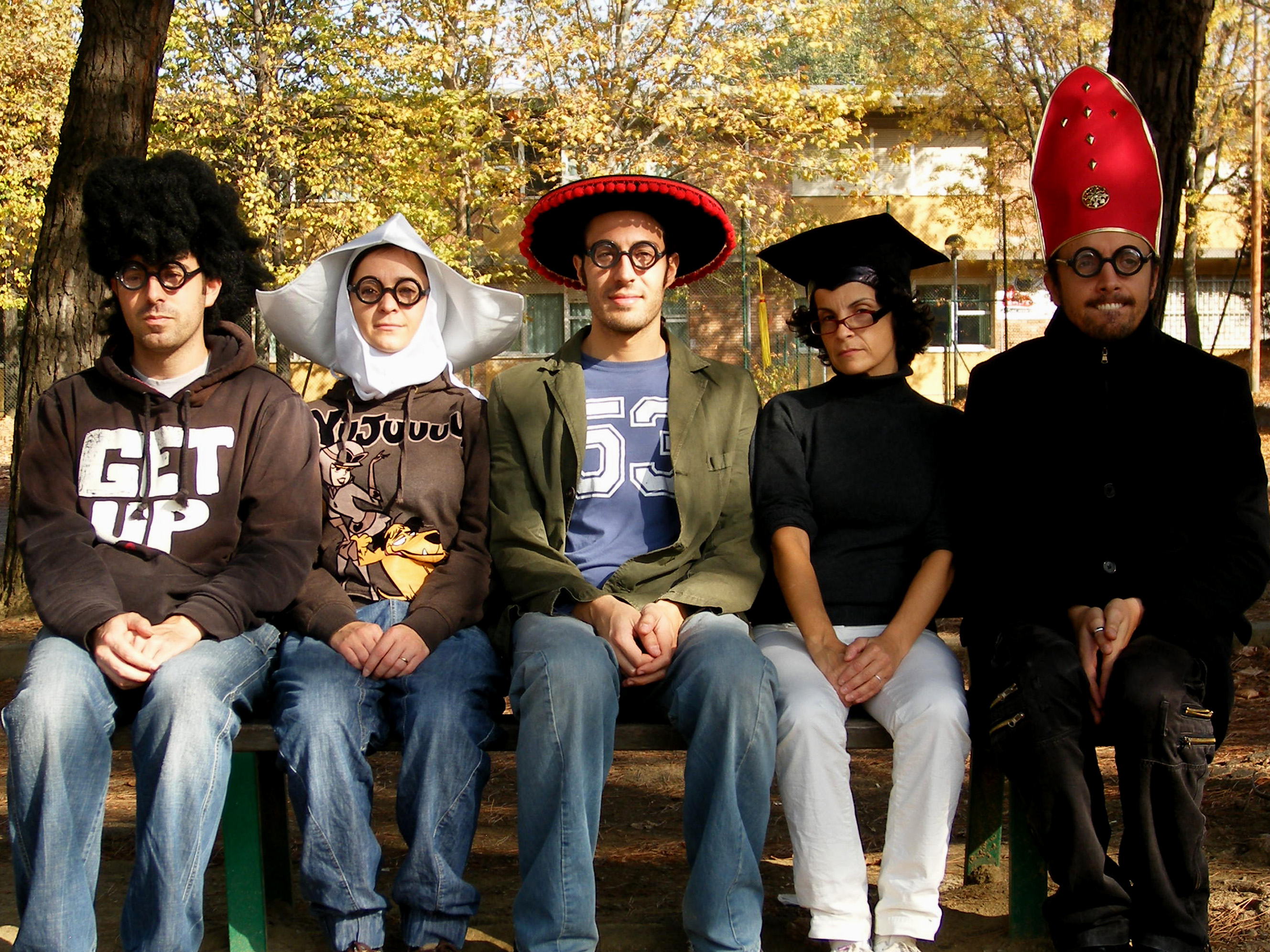 Gruppo di teatro di cabaret Oblivion (Bologna)